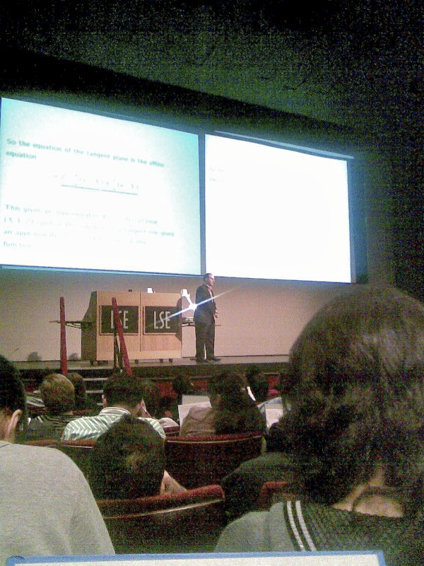 Lecture at LSE